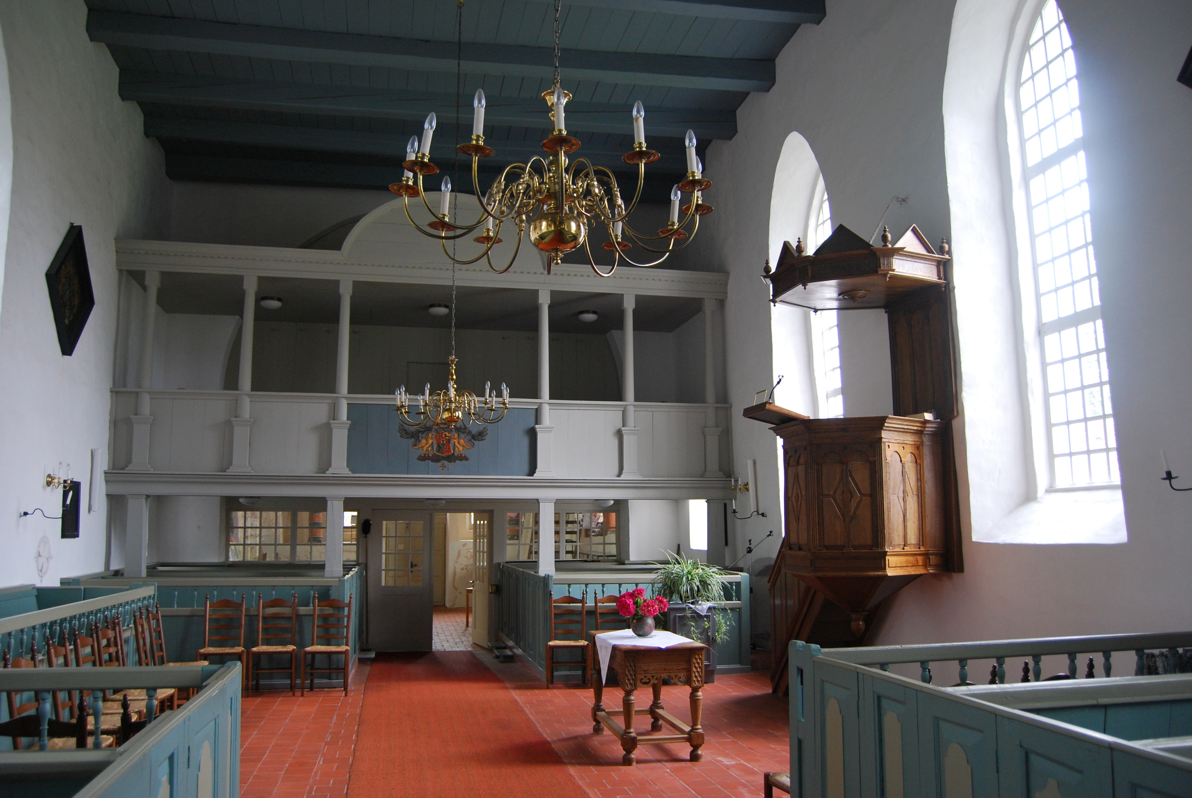 Reformierte Rysumer Kirche, Gottesdienstraum, 2015